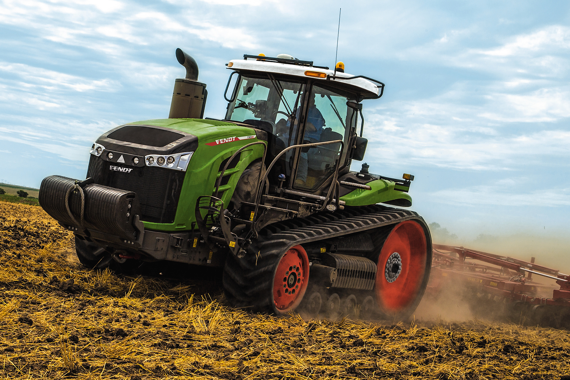 Fendt 1100 MT mit Anbaugerät von Sunflower